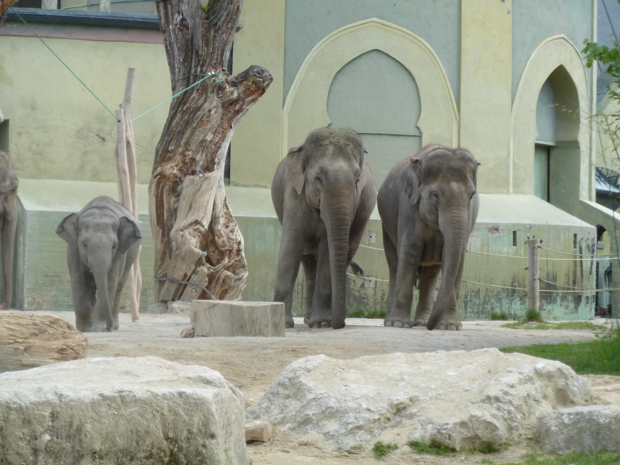 Elefanten in München